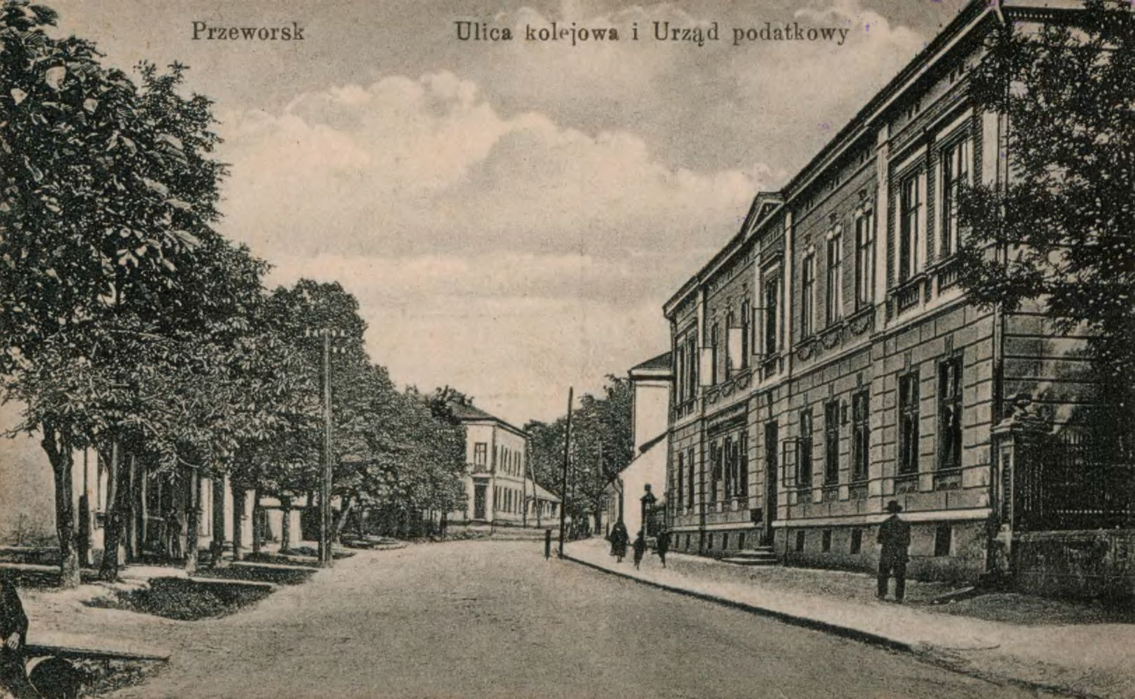 Urząd podatkowy (Kasa Zaliczkowa) w Przeworsku przed 1939